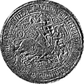 Sello de placa sobre papel y oblea de la Diputación del General de finales del siglo XV que representa a su patrón portando el escudo de la Cruz de San Jorge que eran las armas de la Generalitat de Catalunya. Leyenda (letra minúscula gótica quebrada), S(igillum) : CORTIUM : ET : PARLAMENTORUM : GENERALIUM : PRINCIPATUS : CATHALONIE Fuente: Alberto Montaner Frutos, El señal del rey de Aragón: Historia y significado, Zaragoza, Institución «Fernando el Católico», 1995, p. 156, fig. 68. ISBN 84-7820-283-8.